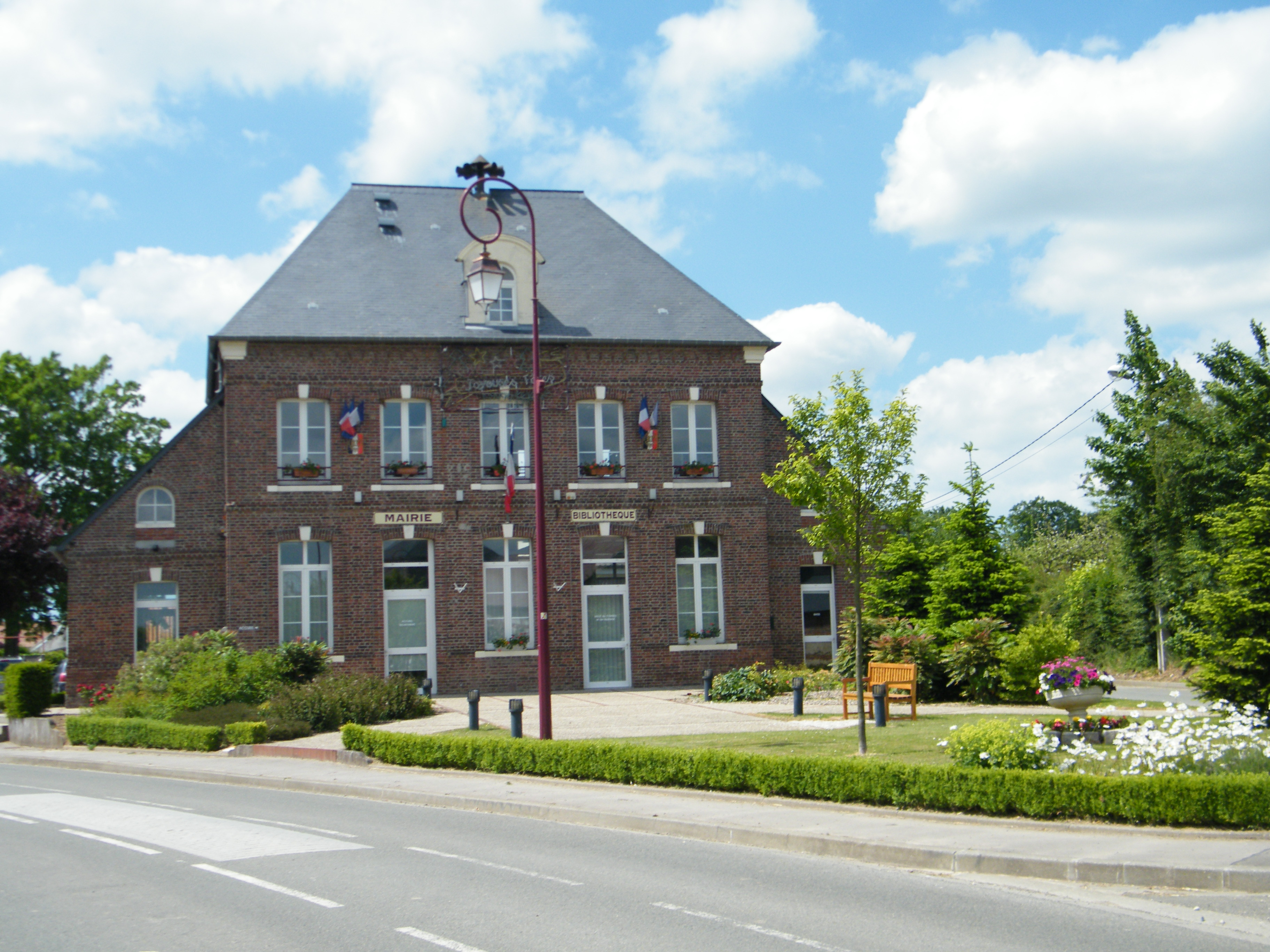 Mairie.